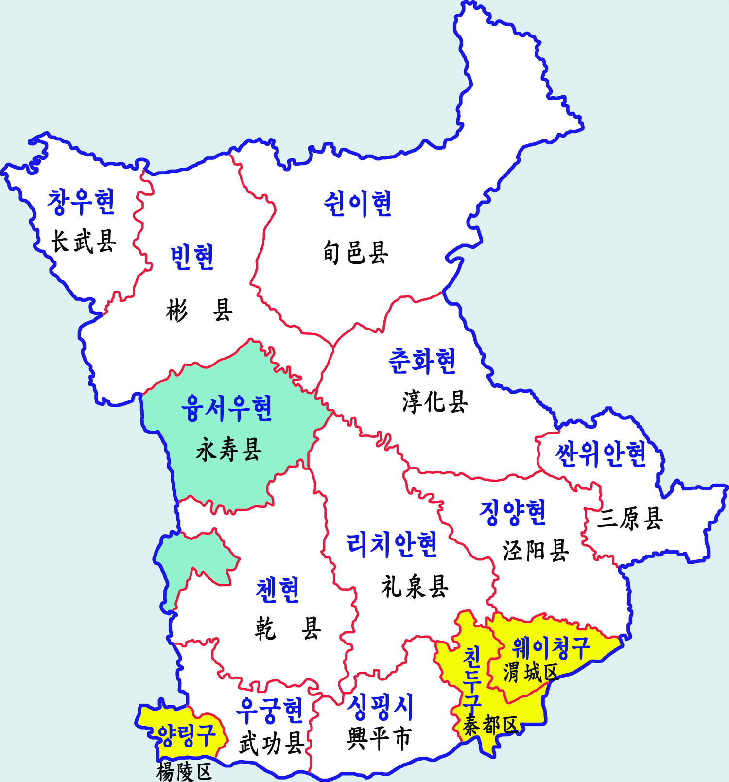 셴양시 현급행정구역도